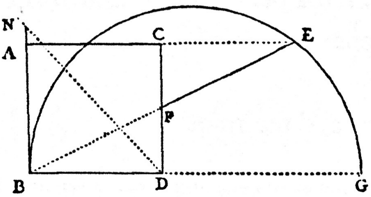 Problema a la Geometria de Descartes